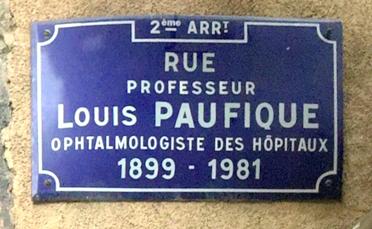 Image de Lyon en mars 2016.